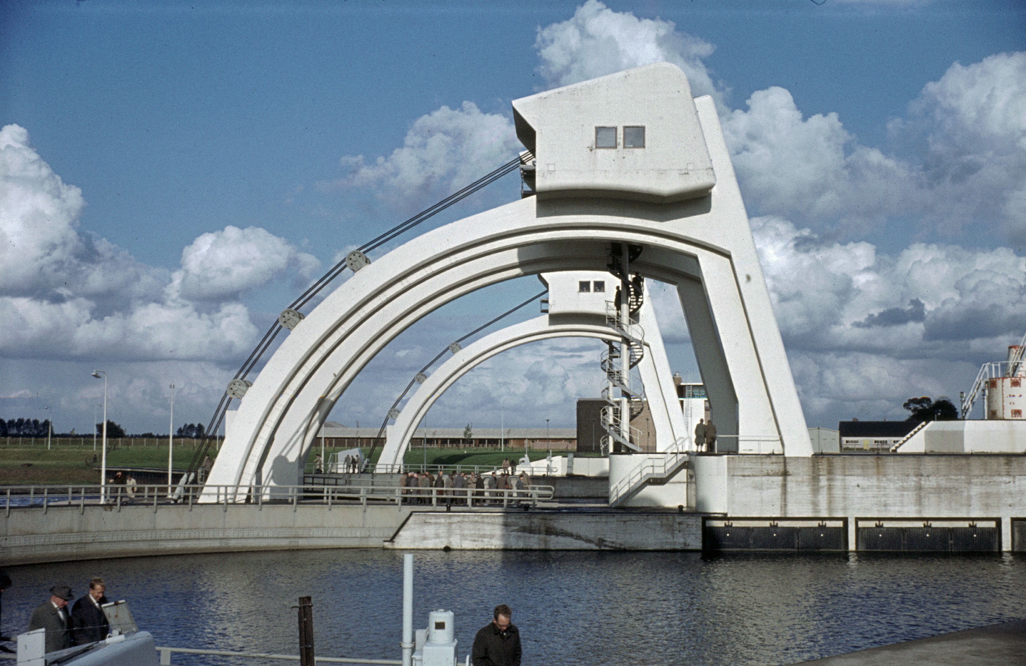 Wederopbouw/ Stuw: Overzicht stuwcomplex met schutsluis